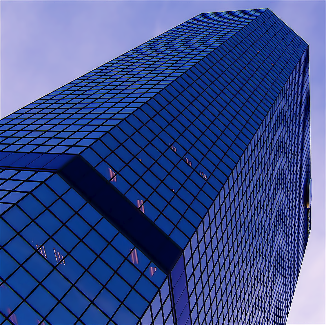 AT&T building in San Diego, USA